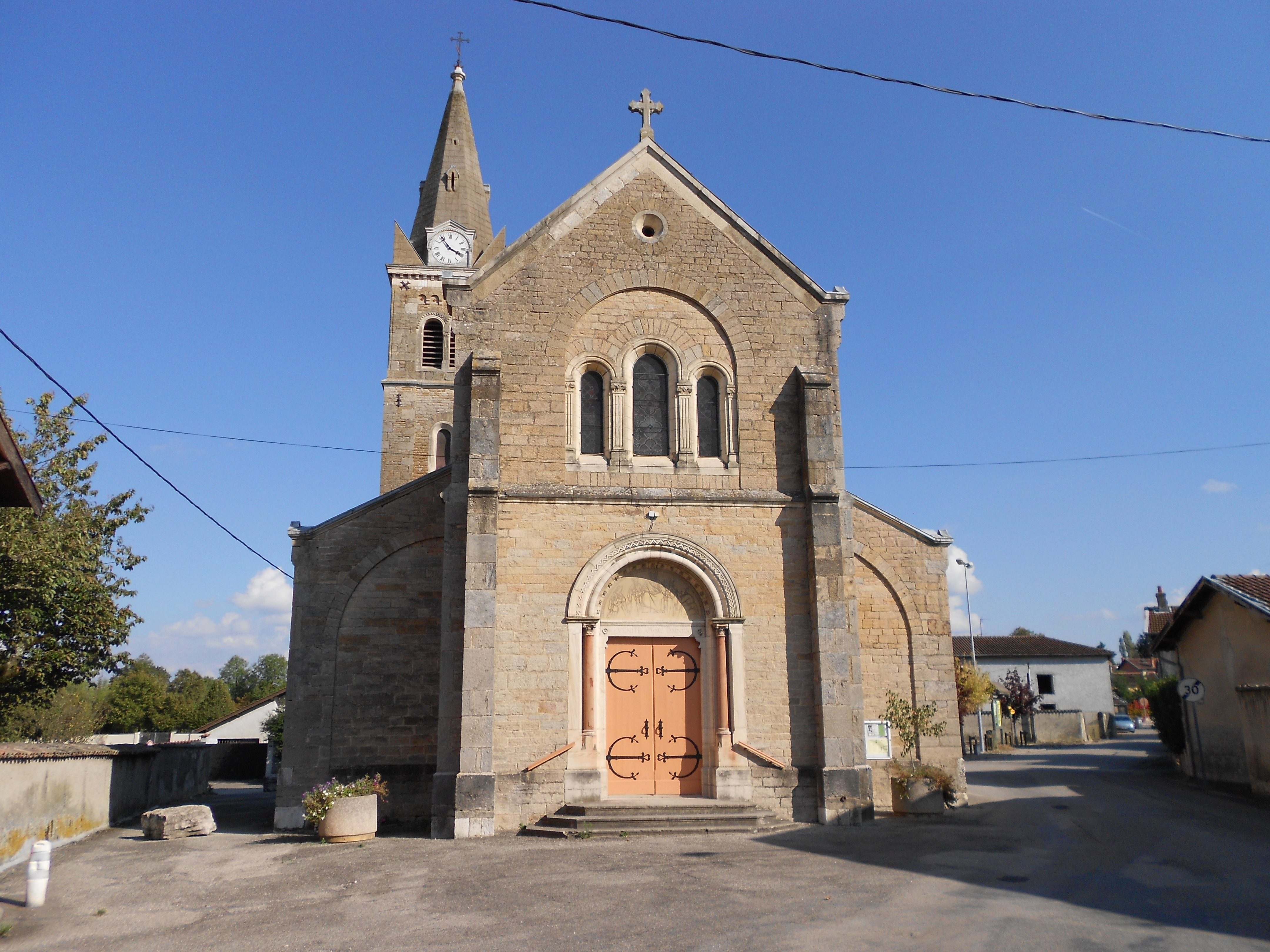 une photo du porche de l'église